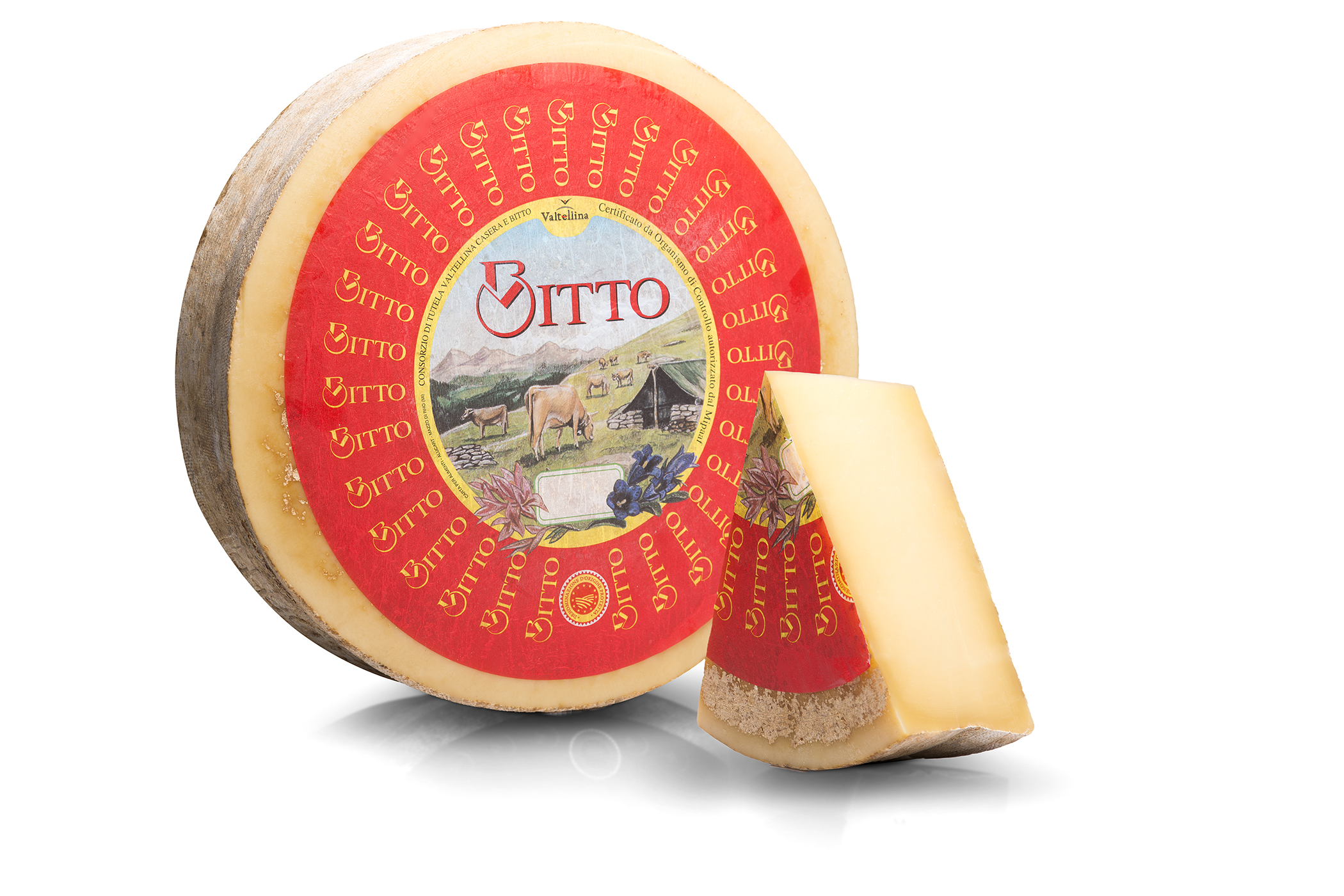 Formaggio Bitto DOP